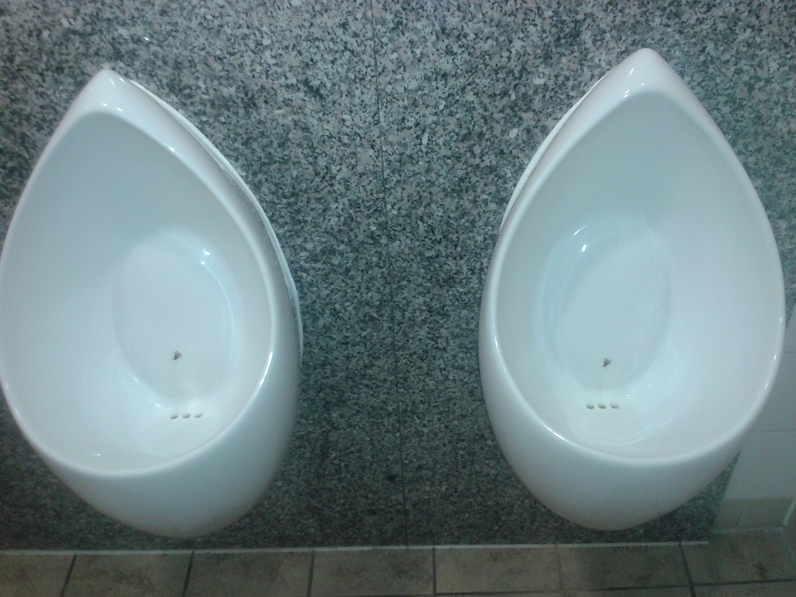 Toilette/Pissoir in Restaurant mit Fliegen als "Ziel" (siehe Nudge)